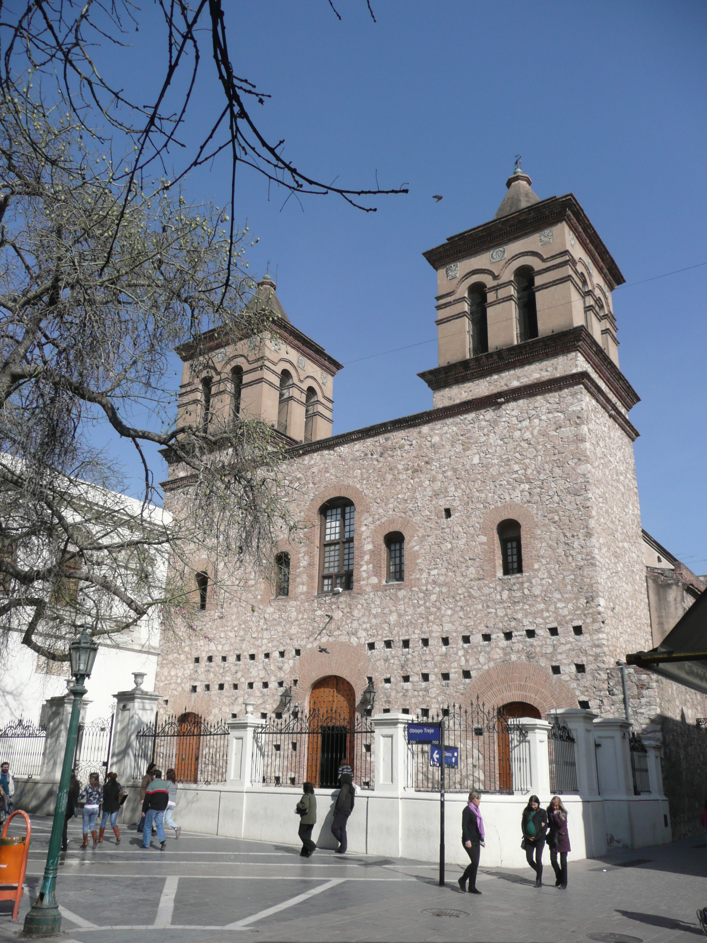 Templo y Colegio de la Compañía de Jesús